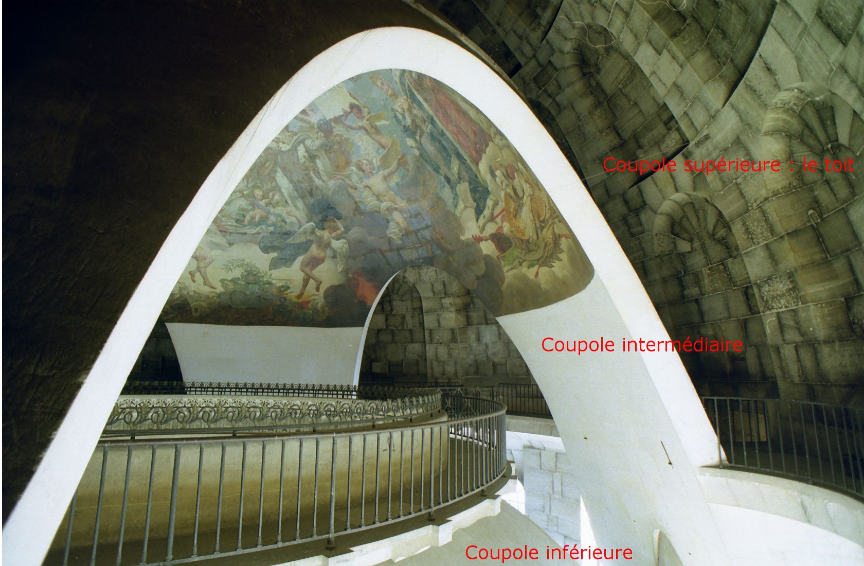 Vue des trois coupoles du Panthéon de Paris Auteur : Inocybe